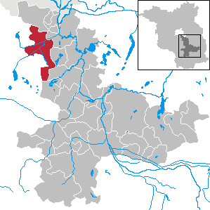 Mittenwalde in Brandenburg (Country) - District Dahme-Spreewald